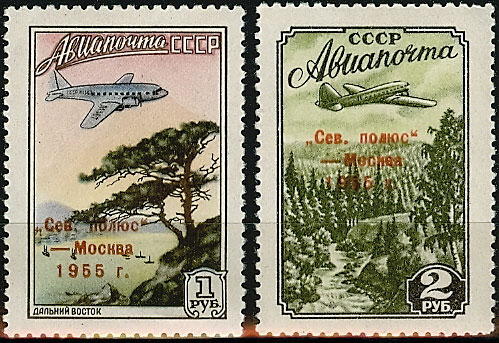 Почтовая марка